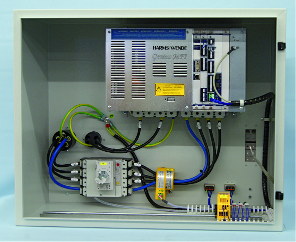 Inverter für das Mittelfrequenzschweißen (Harms & Wende GmbH & Co. KG Hamburg)